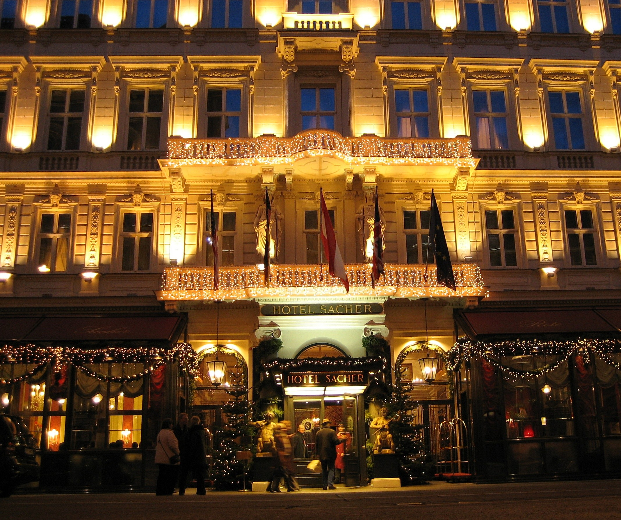 Wien_Hotel_Sacher_Am_Abend